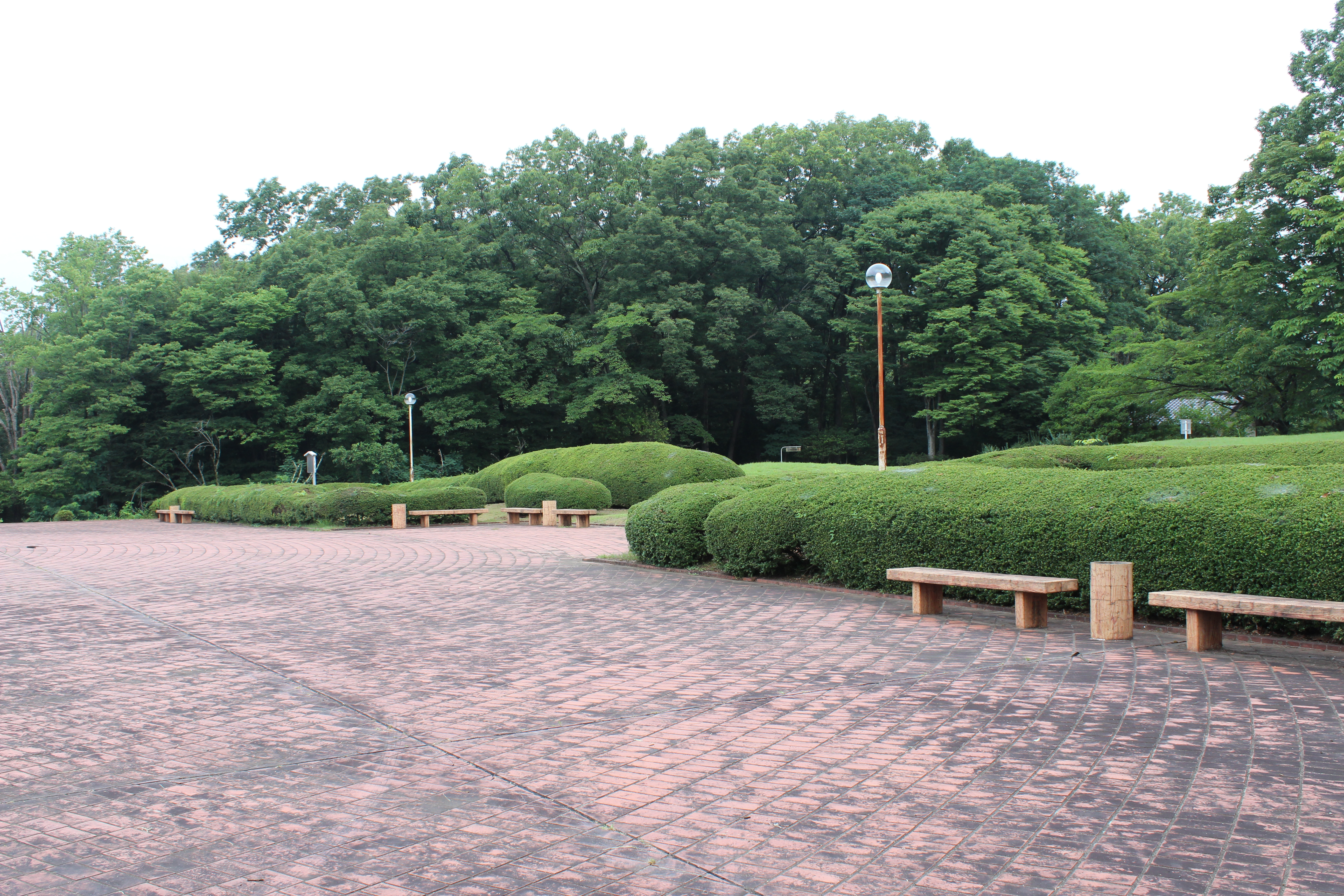 若神子城公園広場